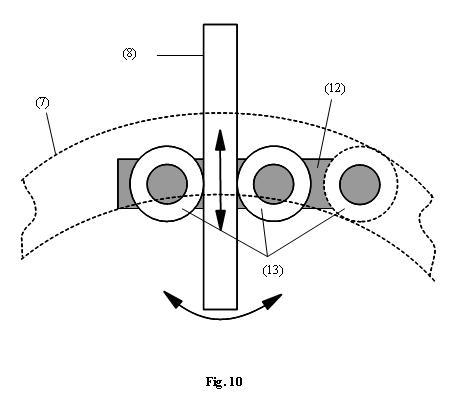 Transmission à variation continue sans adhérence (CVT) détail contact pièces (7) et (8)